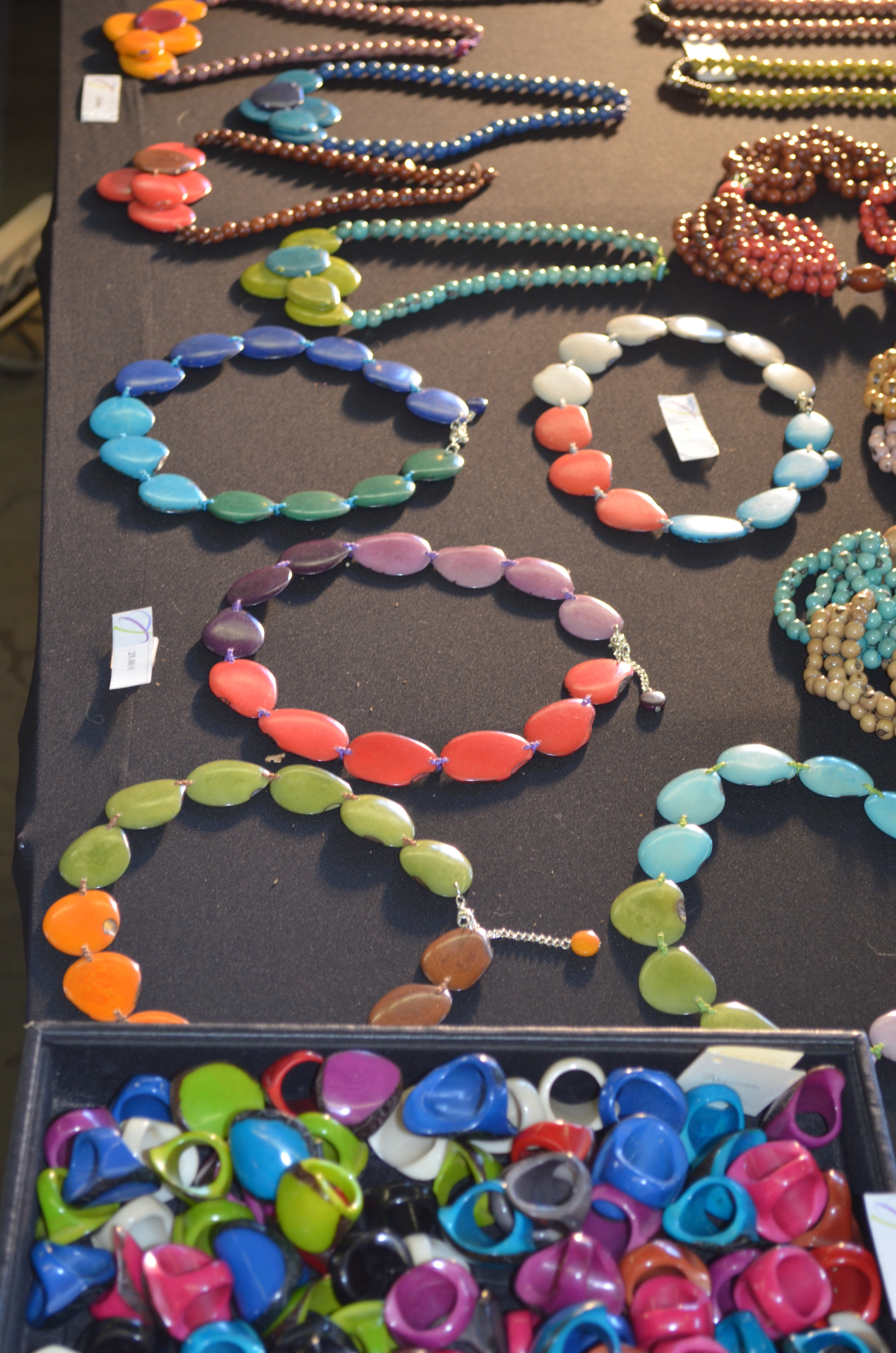 L'ivoire végétale, appelé aussi tagua ou corozo. Fruits présenté lors du salon Bio Foodle 2015 à Charleroi (Belgique). Bijoux réalisés dans cette matière.